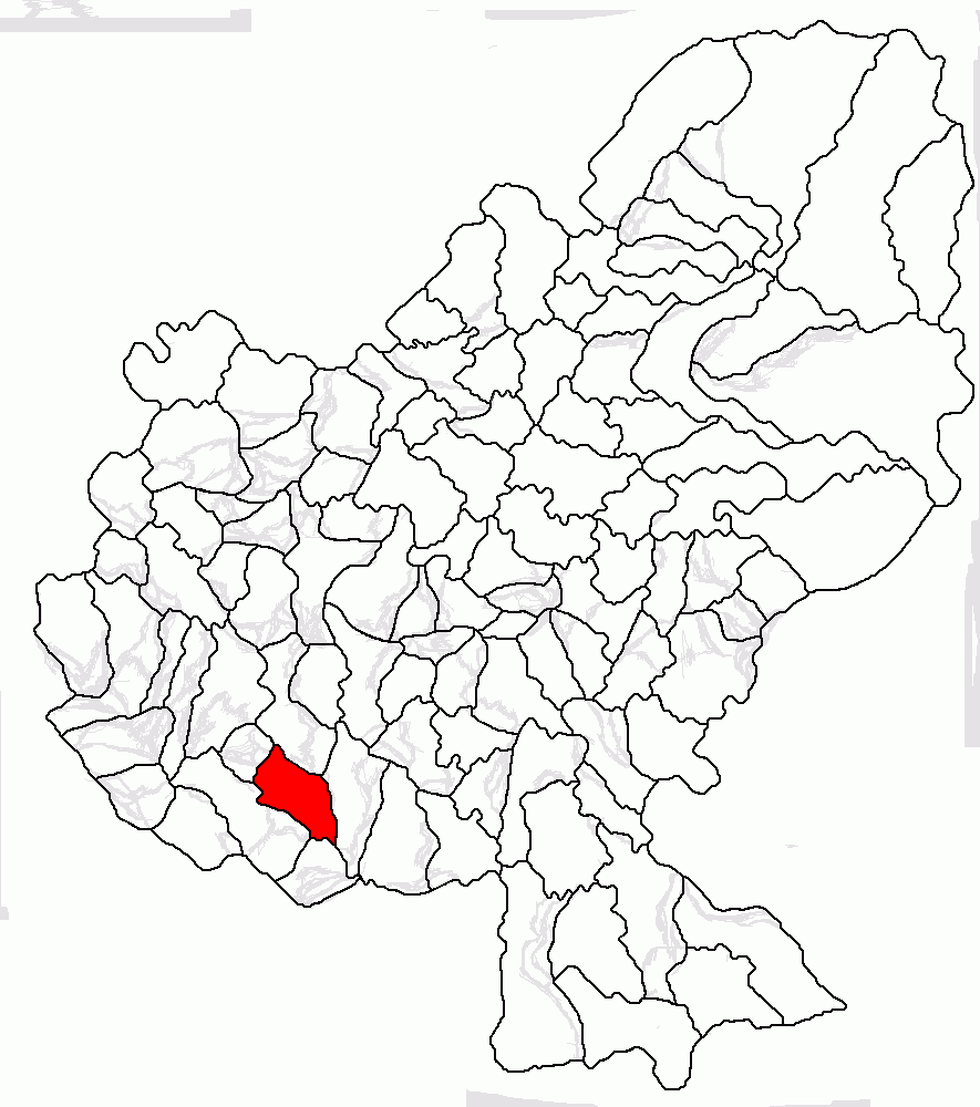 Categorie:Hărţi ale judeţului Mureş